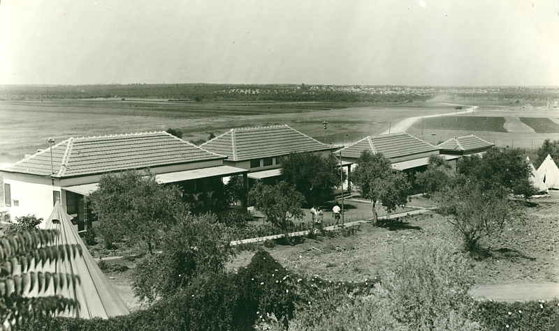 he:כפר הנוער בן שמן בסוף שנות ה-20 / שנות ה-30 של המאה ה-20